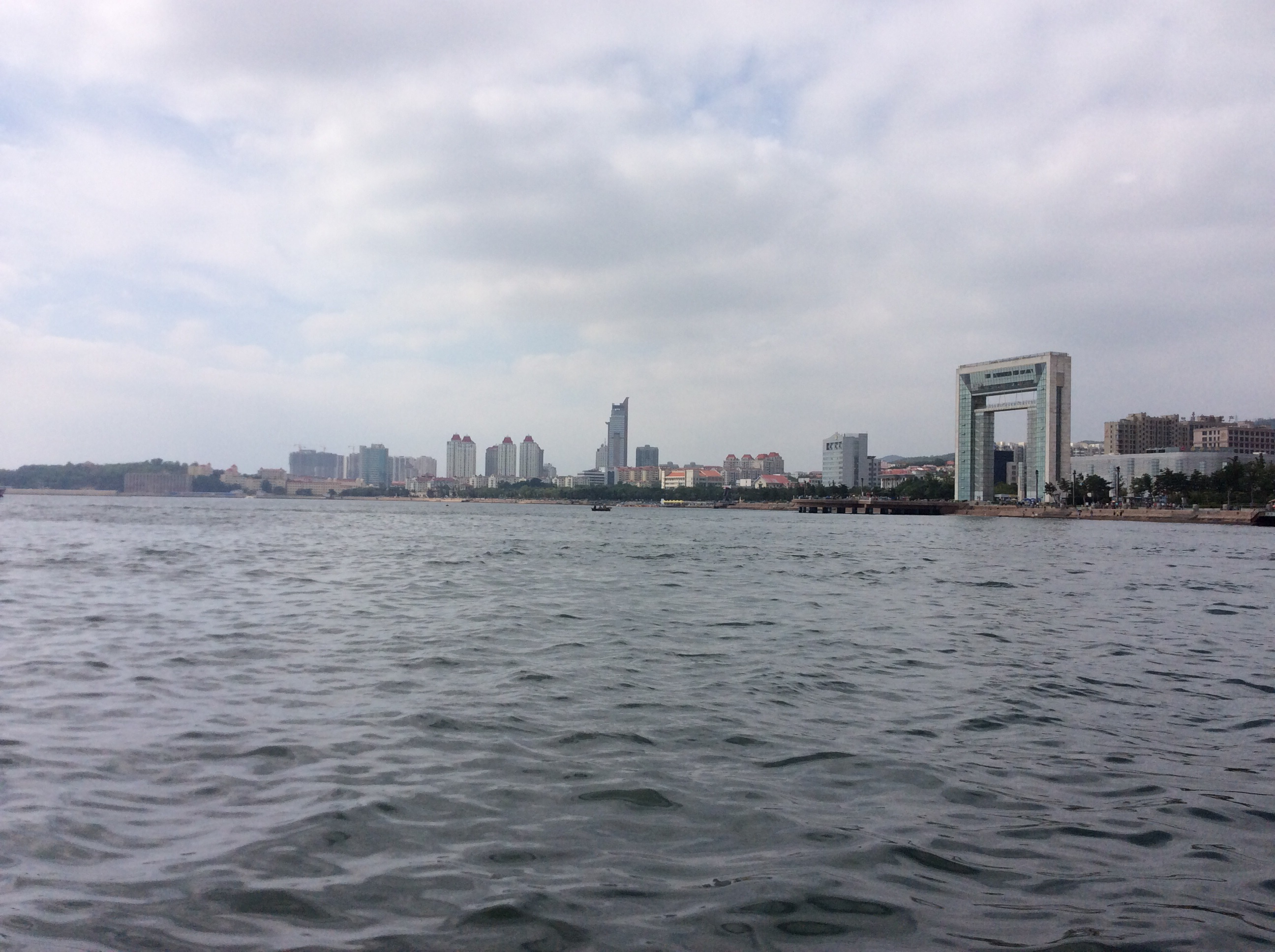 威海海岸远景。